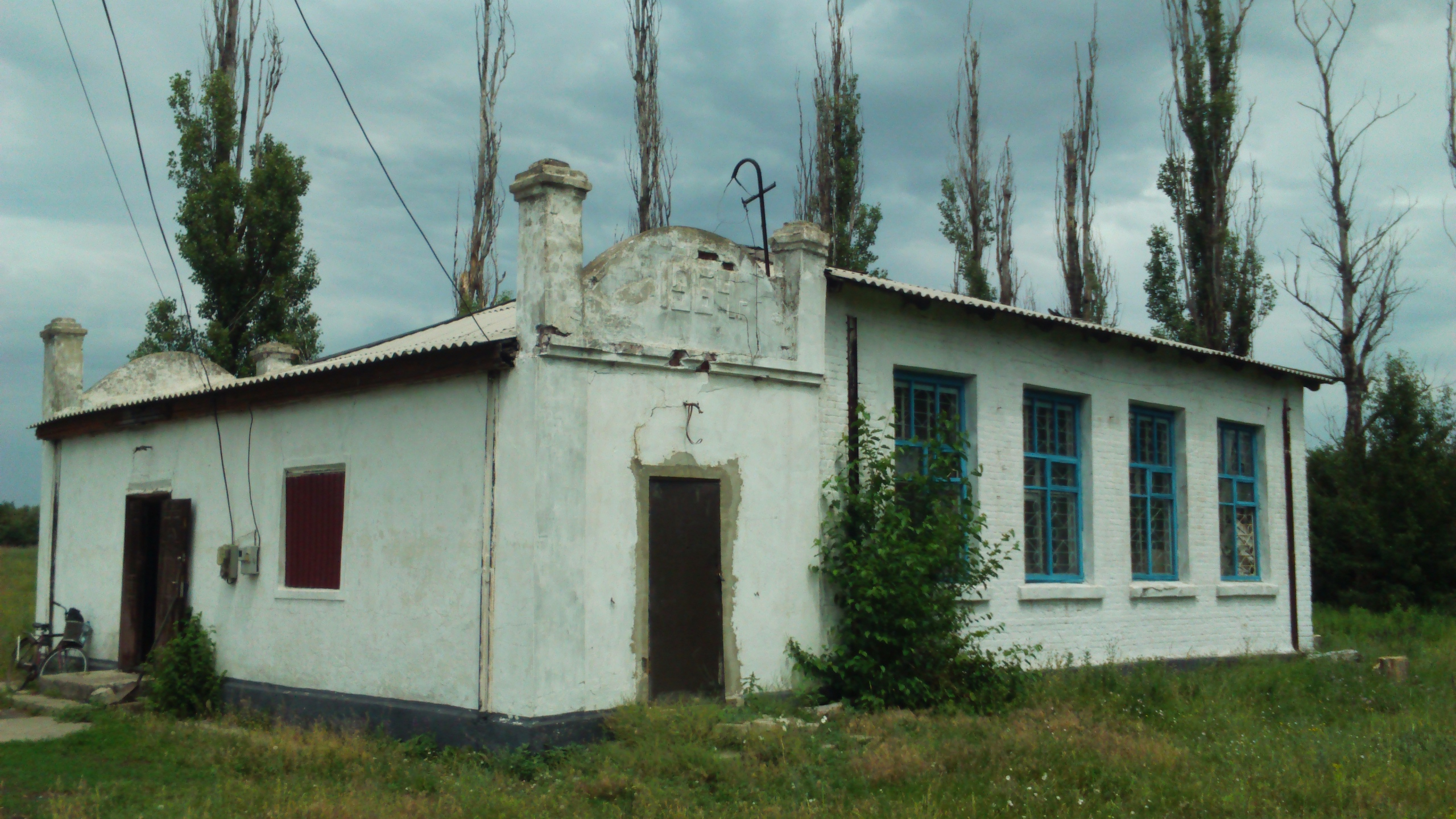 Новоукра́їнка — село в Україні, Добропільському районі Донецької області.